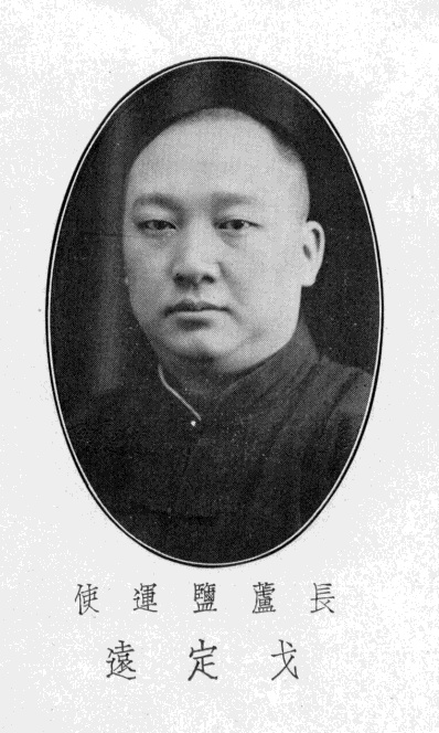 中文（台灣）: 長蘆鹽運使戈定遠